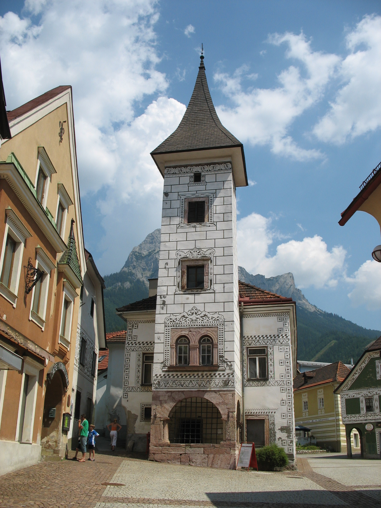 Eisenerz, Steiermark, Altes Rathaus